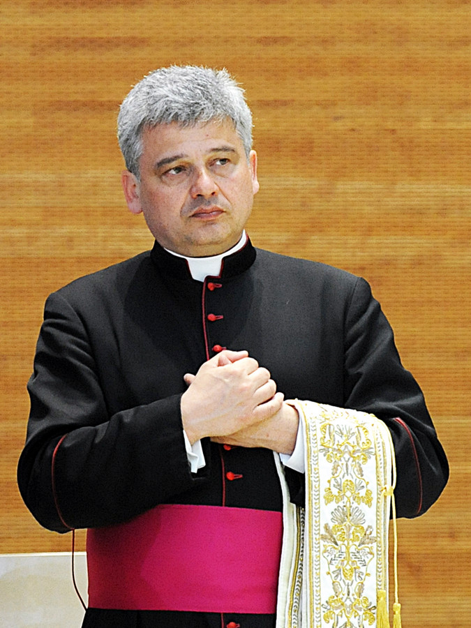 Konrad Krajewski in 2010